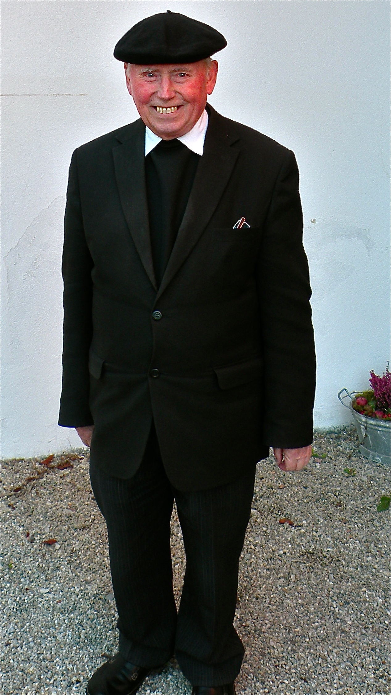 Josef Grafeneder, Pfarrer zunächst von Mitterkirchen im Machland, dann von Münzbach im Bezirk Perrg in Oberösterreich